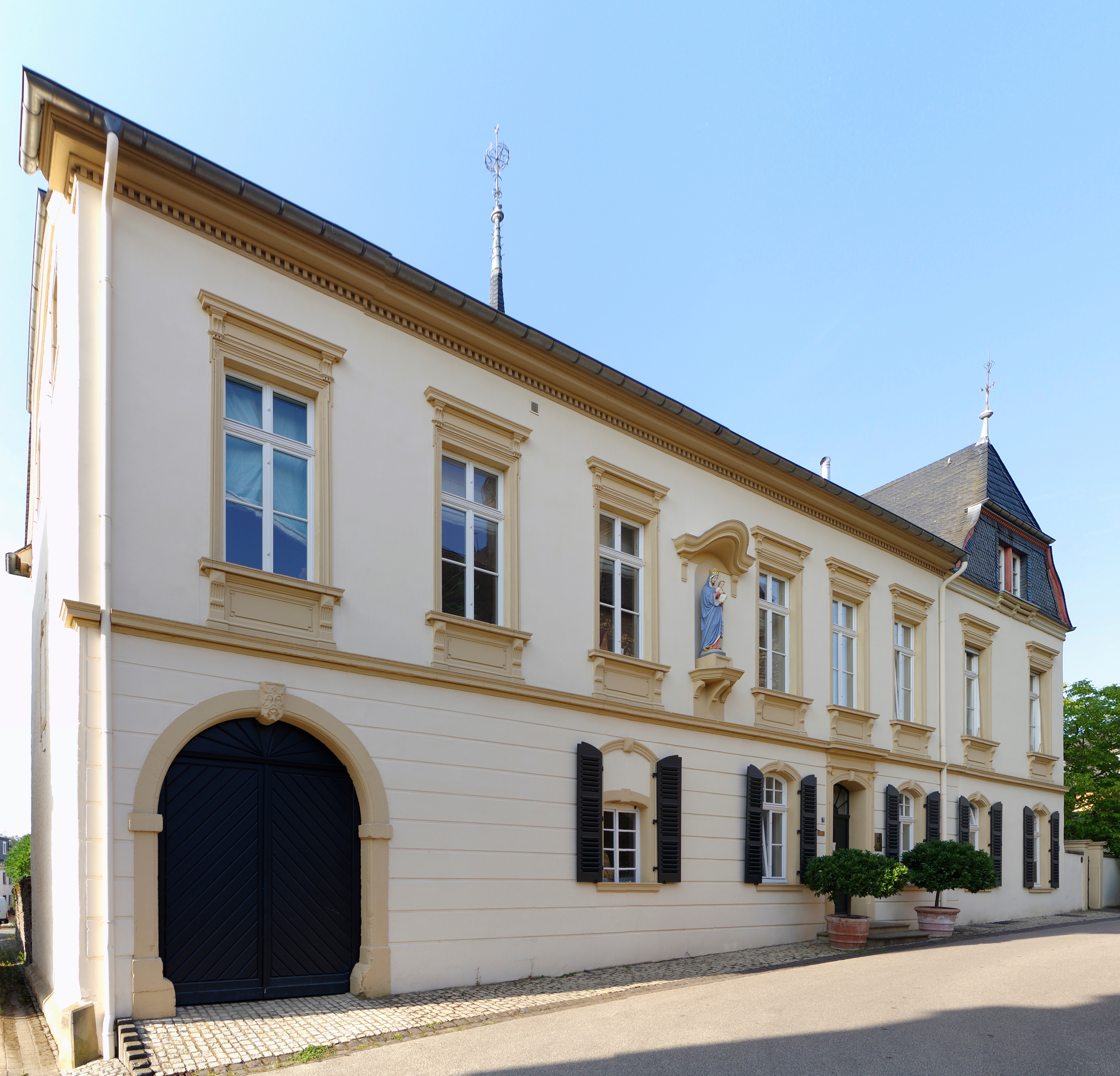 Wiltingen, Dehenstraße 2, Weingut Van Volxem, barockes Quereinhaus, bezeichnet 1743, neubarocke Erweiterung und Überformung 1899. Teilbau ist am Keilstein des hofseitigen Torbogens 1743 datiert (der ebenso rundbogige straßenseitige Torbogen am Scheitelstein mit bemerkenswerter Blattmaske besetzt).